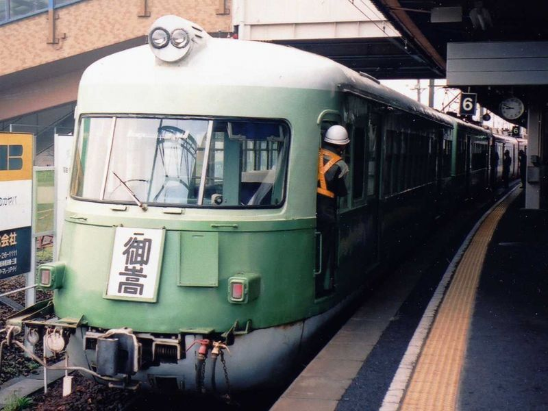 Nagoya Railroad EMU type 3400 "Imomushi" At Inuyama Sta.